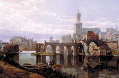 Angers on the Loire (détail), le pont des Treilles, huile sur toile par George Clarkson Stanfield. Vers 1859. Musées d'Angers